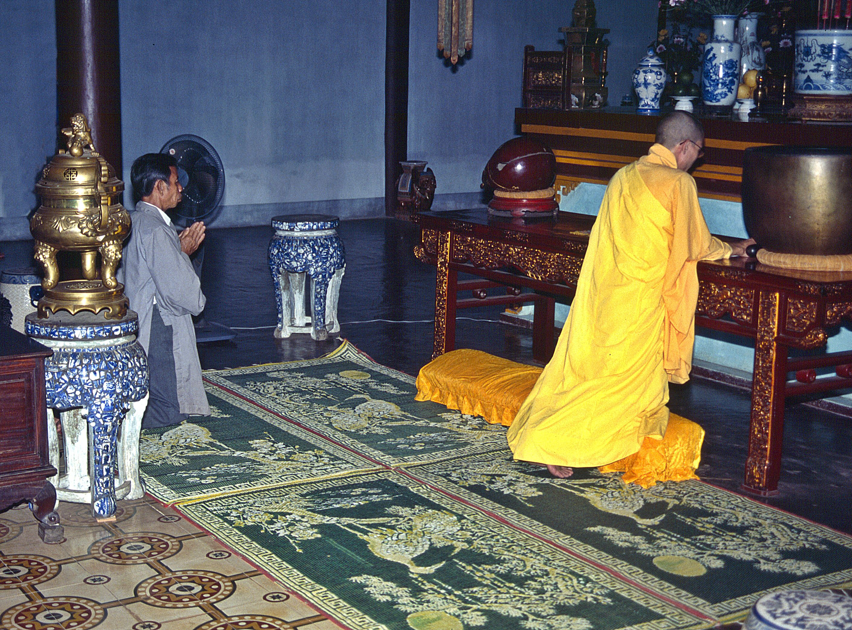 Huế: Thien-Mu-Pagode